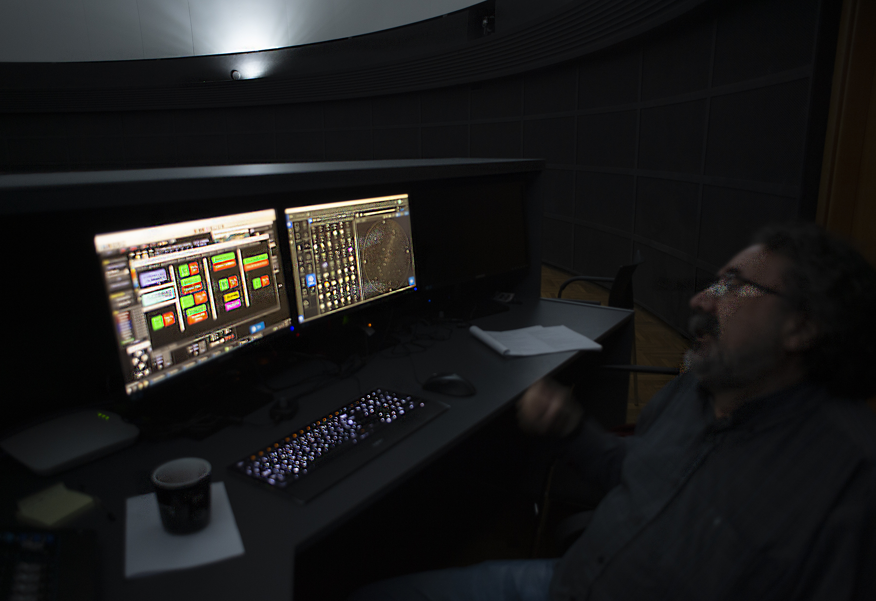 Control del equipo de proyección digital del planetario, Agrimensor Germán Barbato en Montevideo, Uruguay.